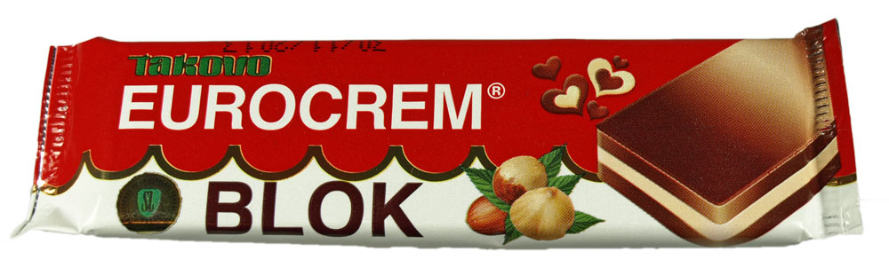 Weitere Informationen hier